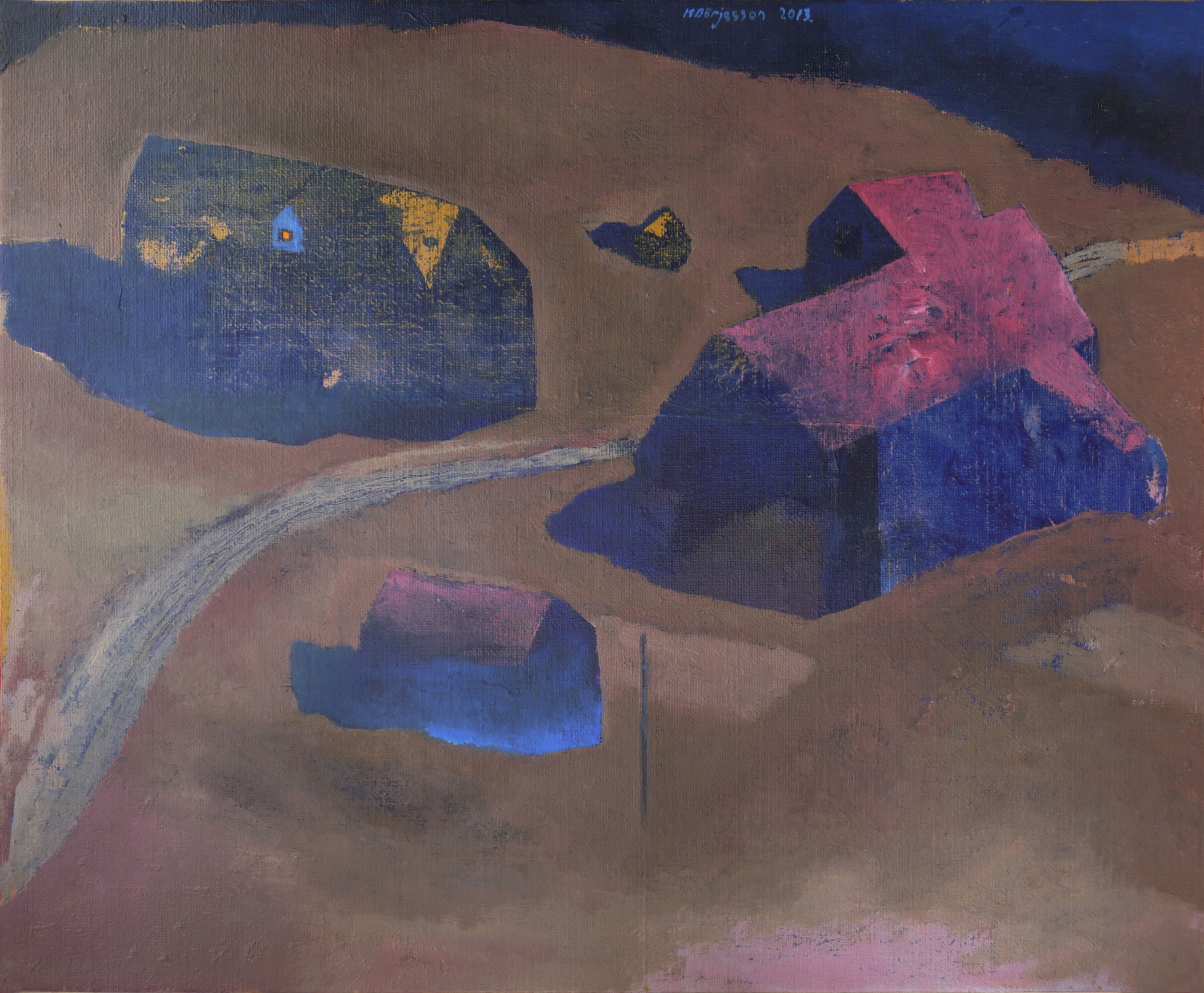 Oljemålning på linneduk.